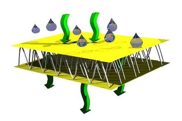 Abstandsgewirke - Funktionsprinzip (Skizze)